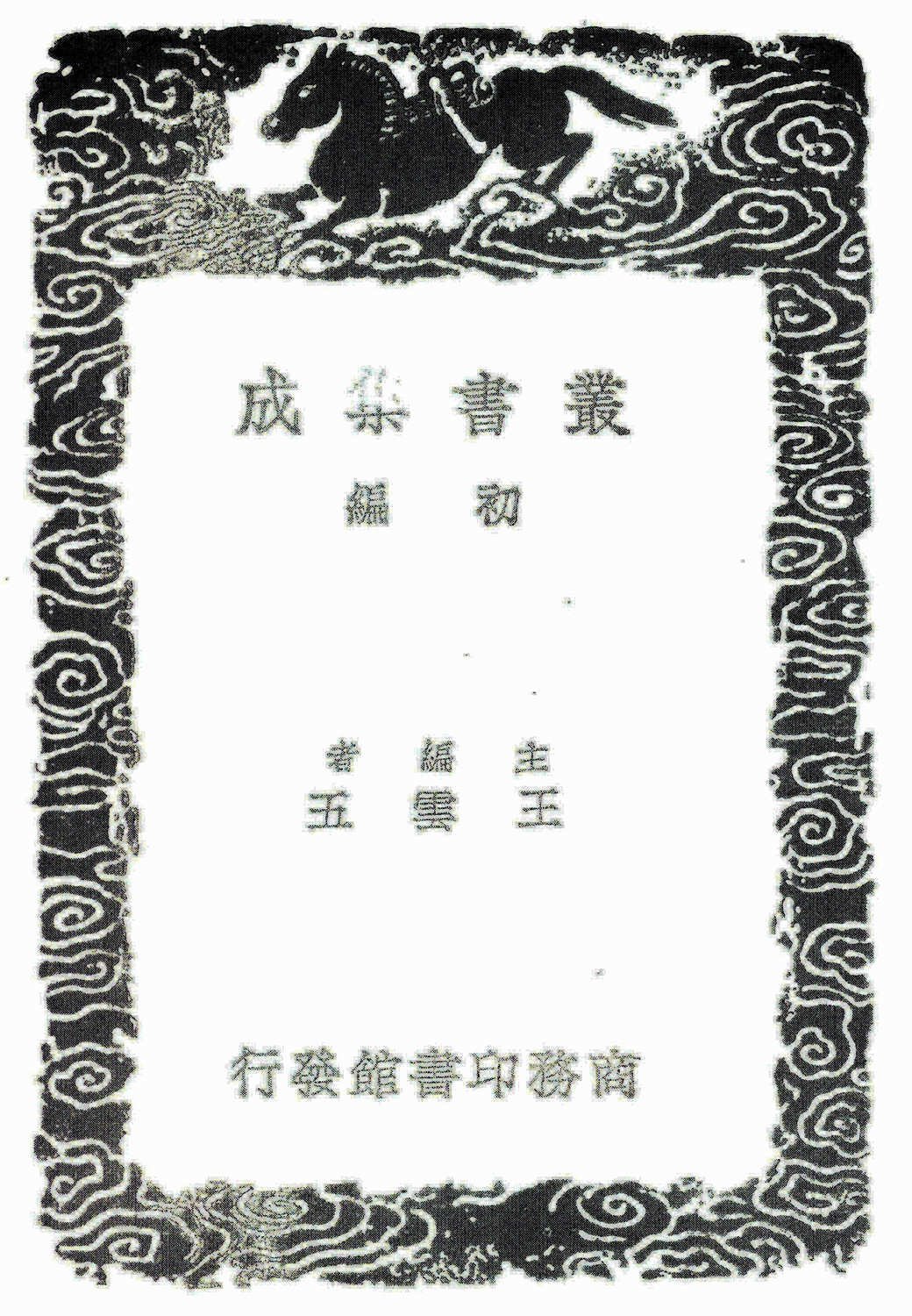 Chinesische Verzierungen